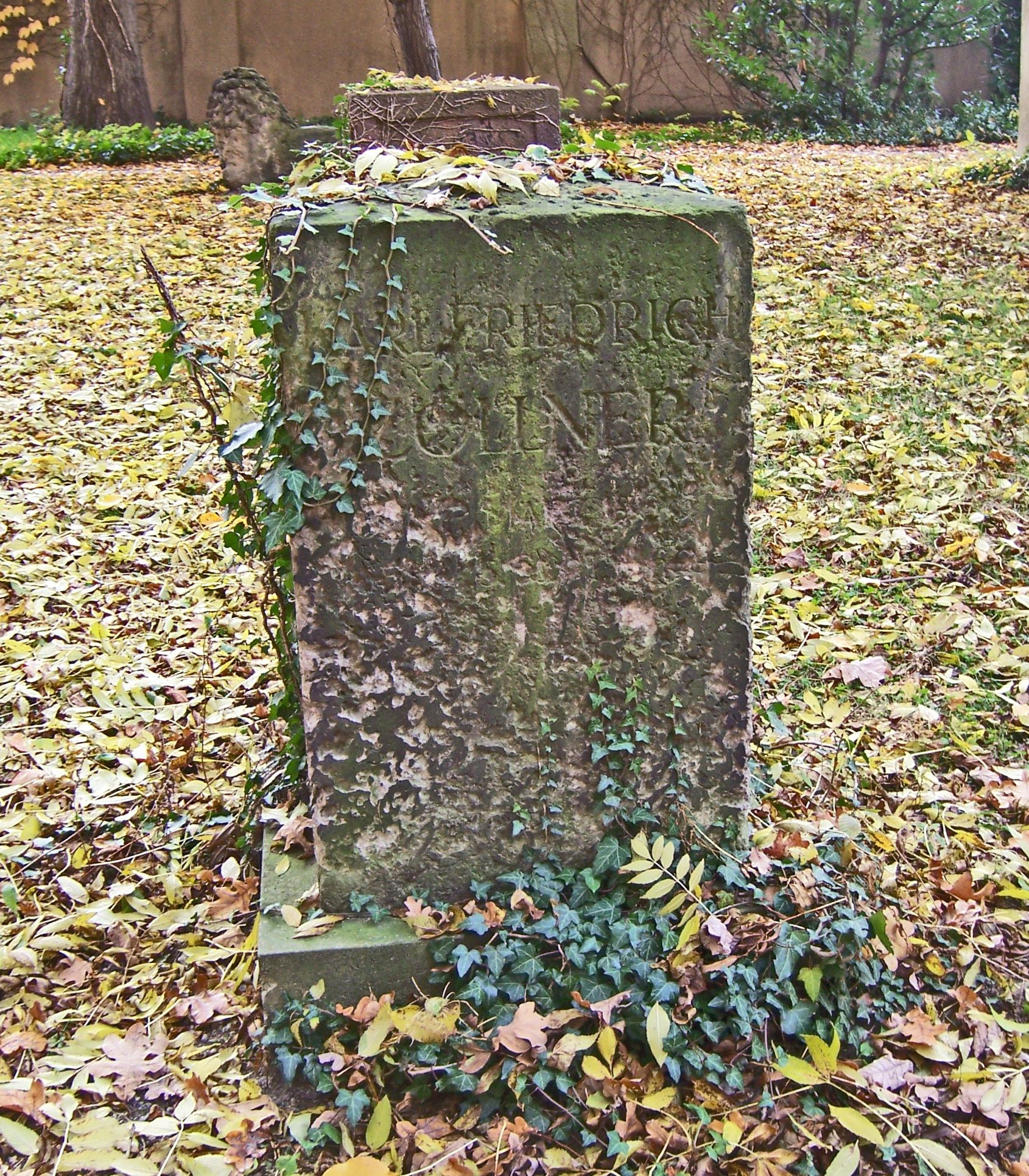 Grabsteinfragment Karl Friedrich Zöllner vom Neuen Johannisfriedhof Leipzig